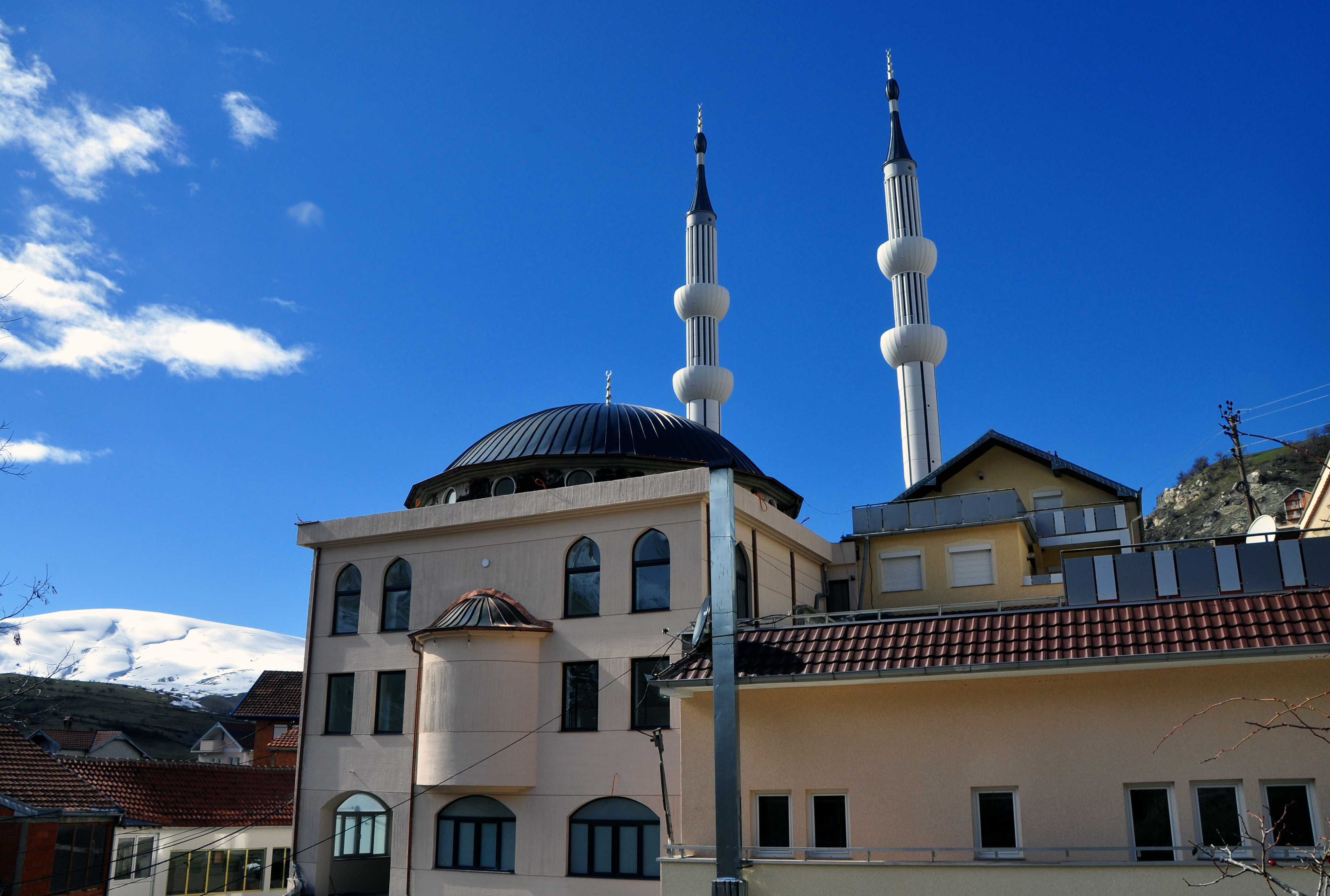 Centralna džamija u Restelici je izgrađena na mestu stare džamije u Restelici, 2016-2018 godine doprinosom meštana Restelice.